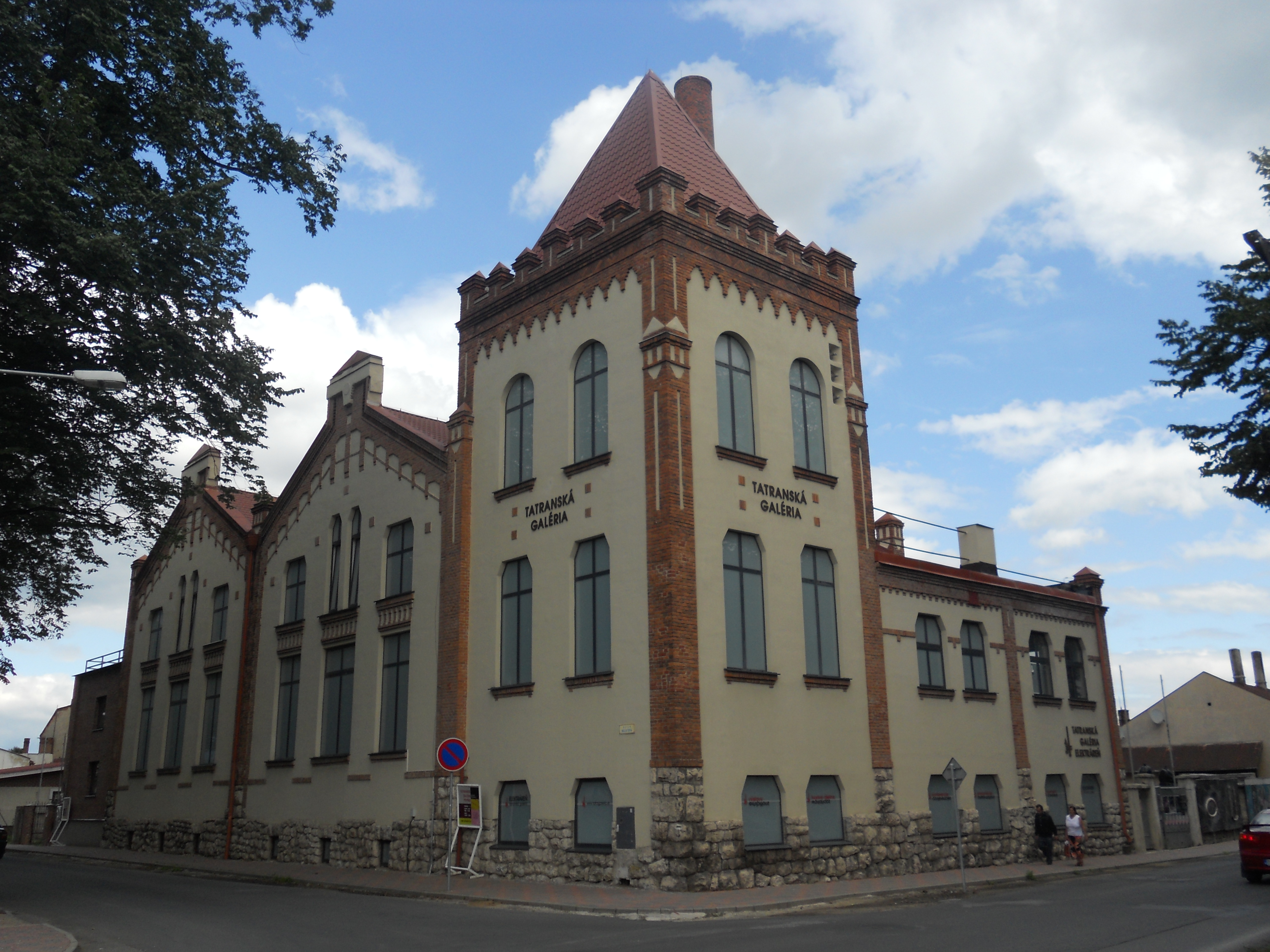 ELEKTRÁREŇ+parná, Tatranská Galéria